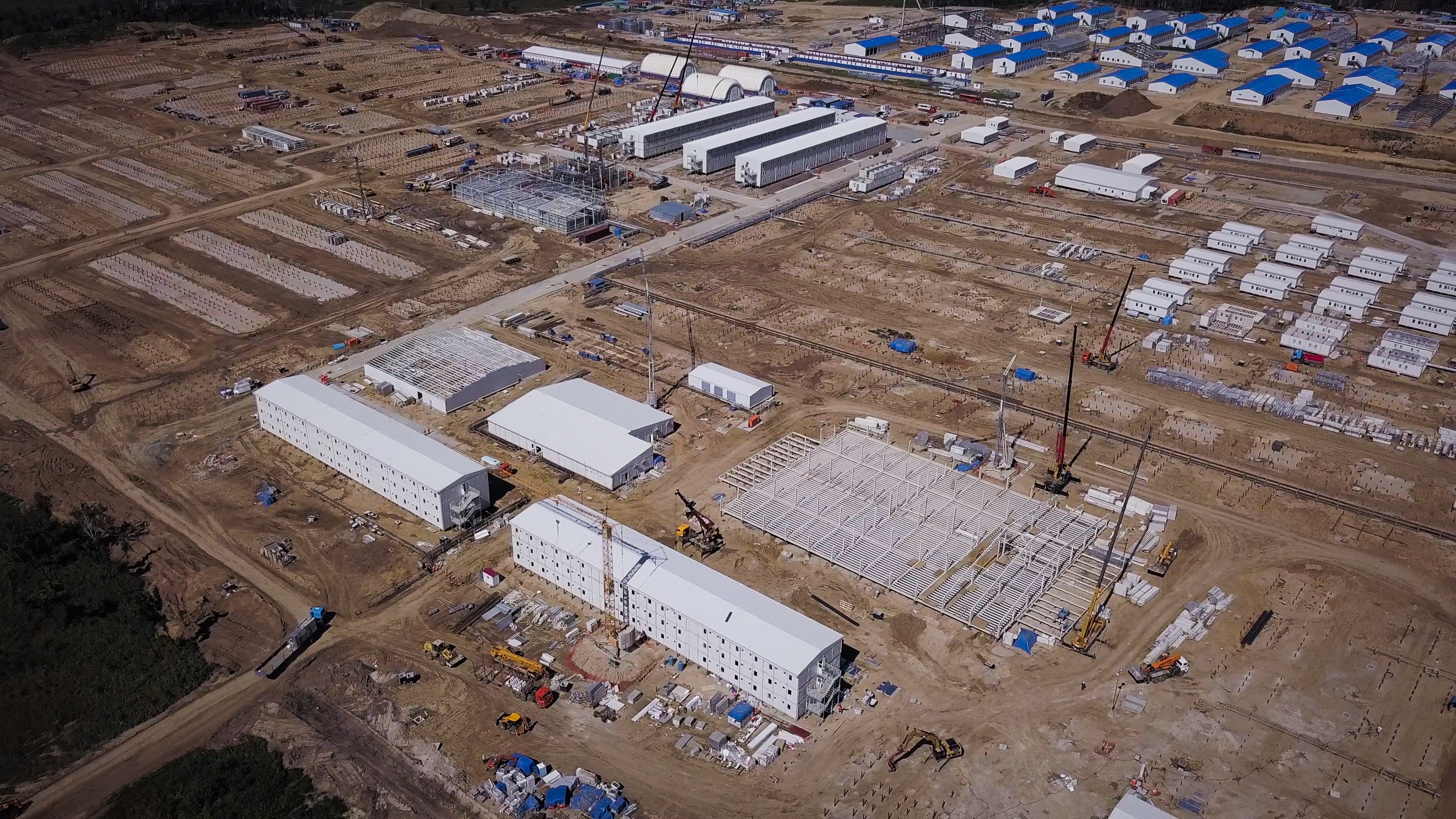 Амурский Газоперерабатывающий завод